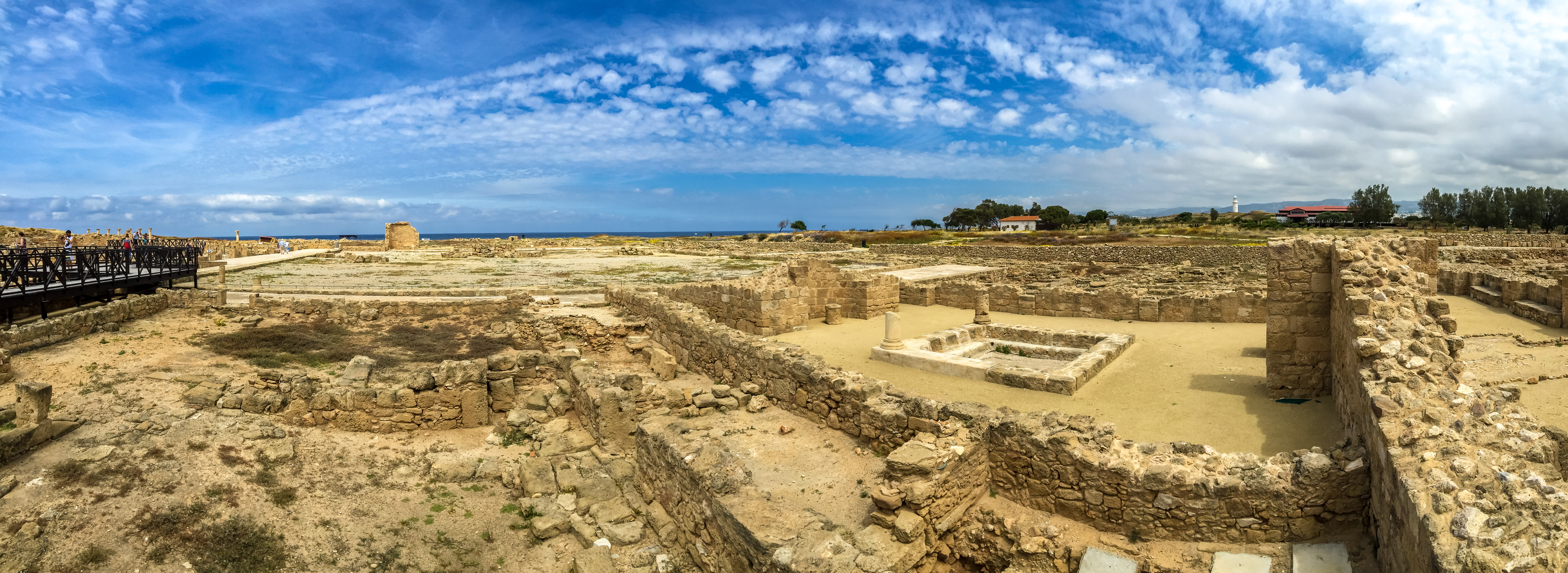 Paphos panorama